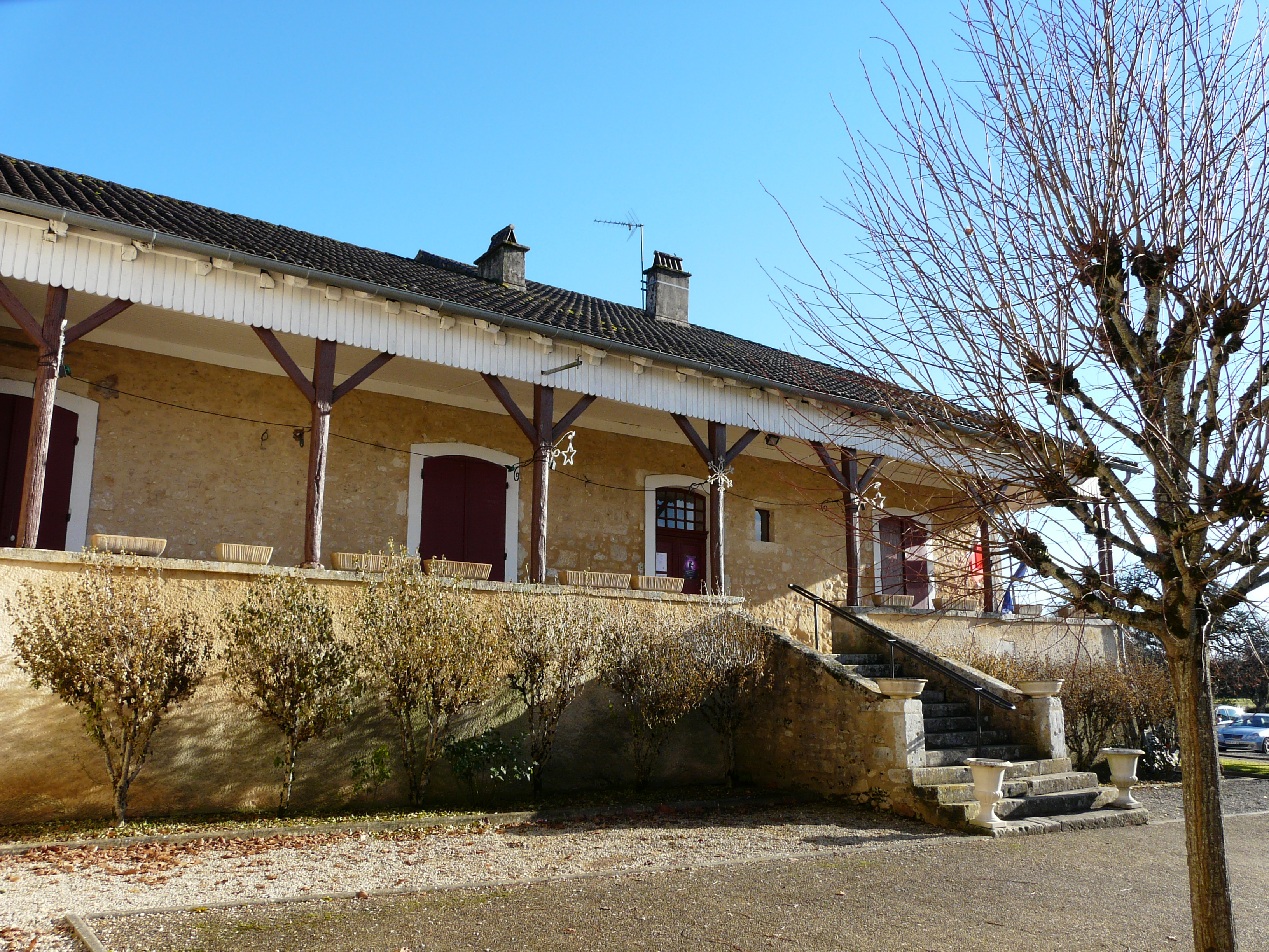 La mairie (ancien presbytère) de Blis-et-Born, Dordogne, France.